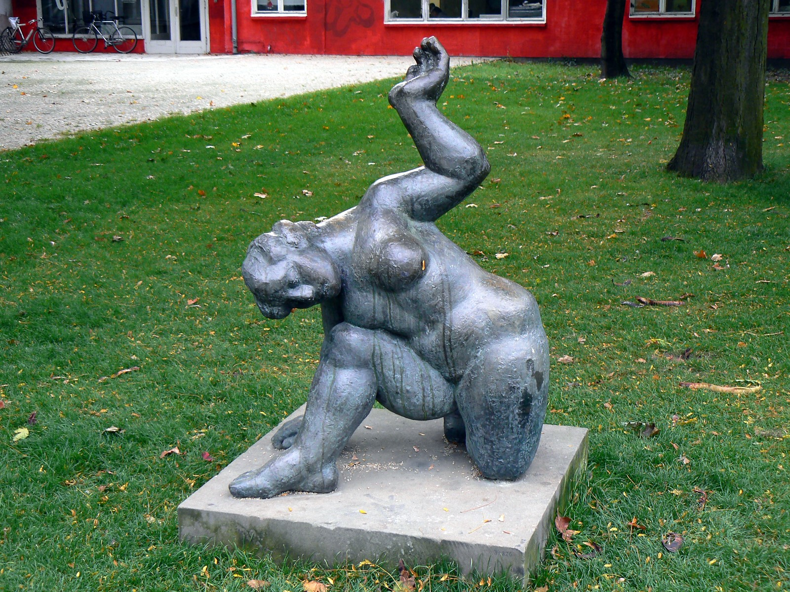 Skulptur Die Erde (1974) by Ingeborg Hunzinger, Monbijoupark in Berlin-Mitte/Berlin/Germany